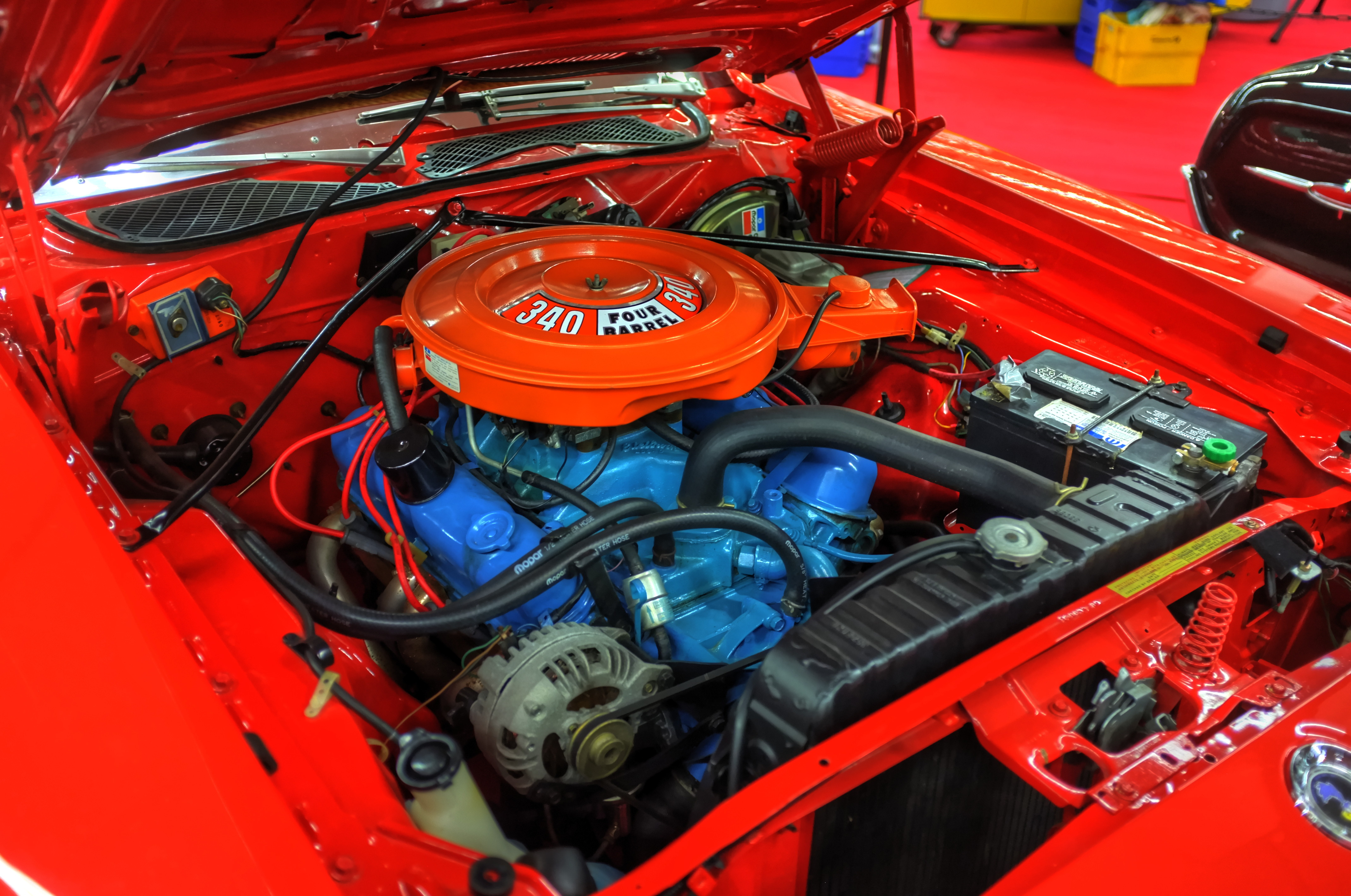 Techno Classica 2013